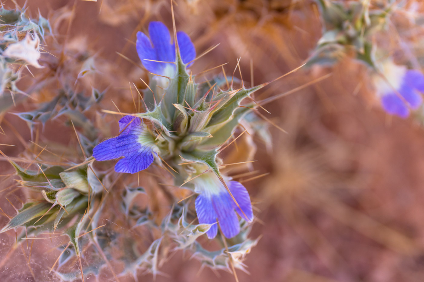 Blepharis obmitrata-1155